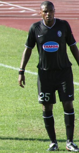 Marcelo Zalayeta durante Rimini-Juventus, prima giornata di serie B 2006/07